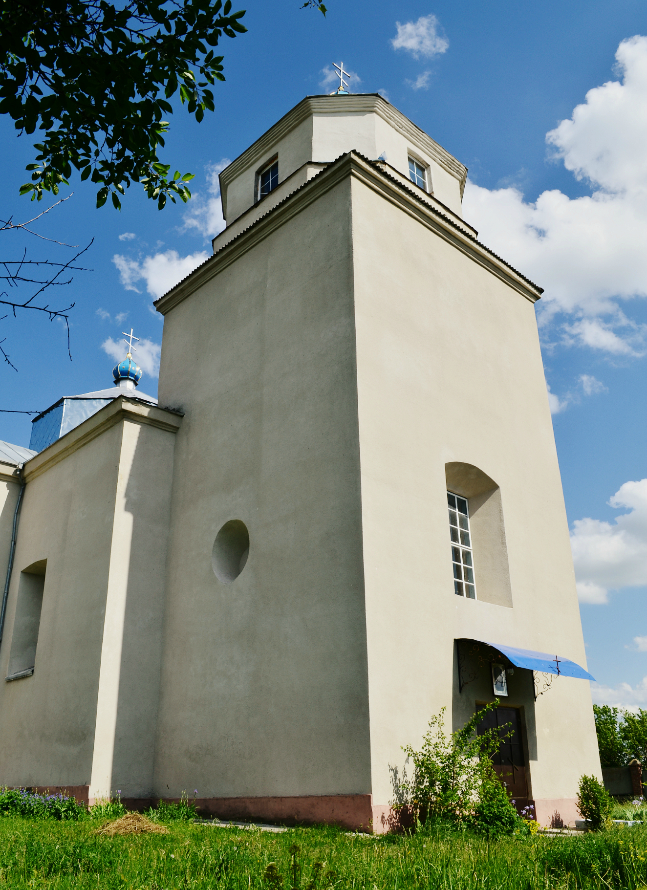 Покровська церква-фортеця (мур.), Шарівка